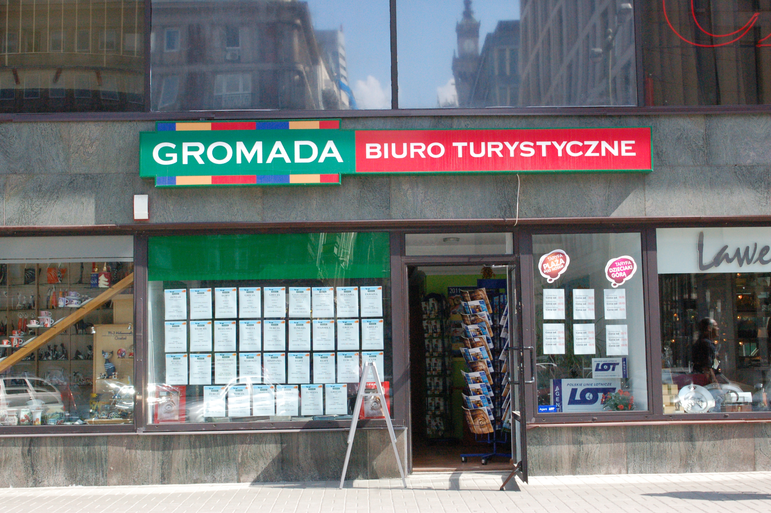 Gromada Hotel Dom Chłopa, Warschau